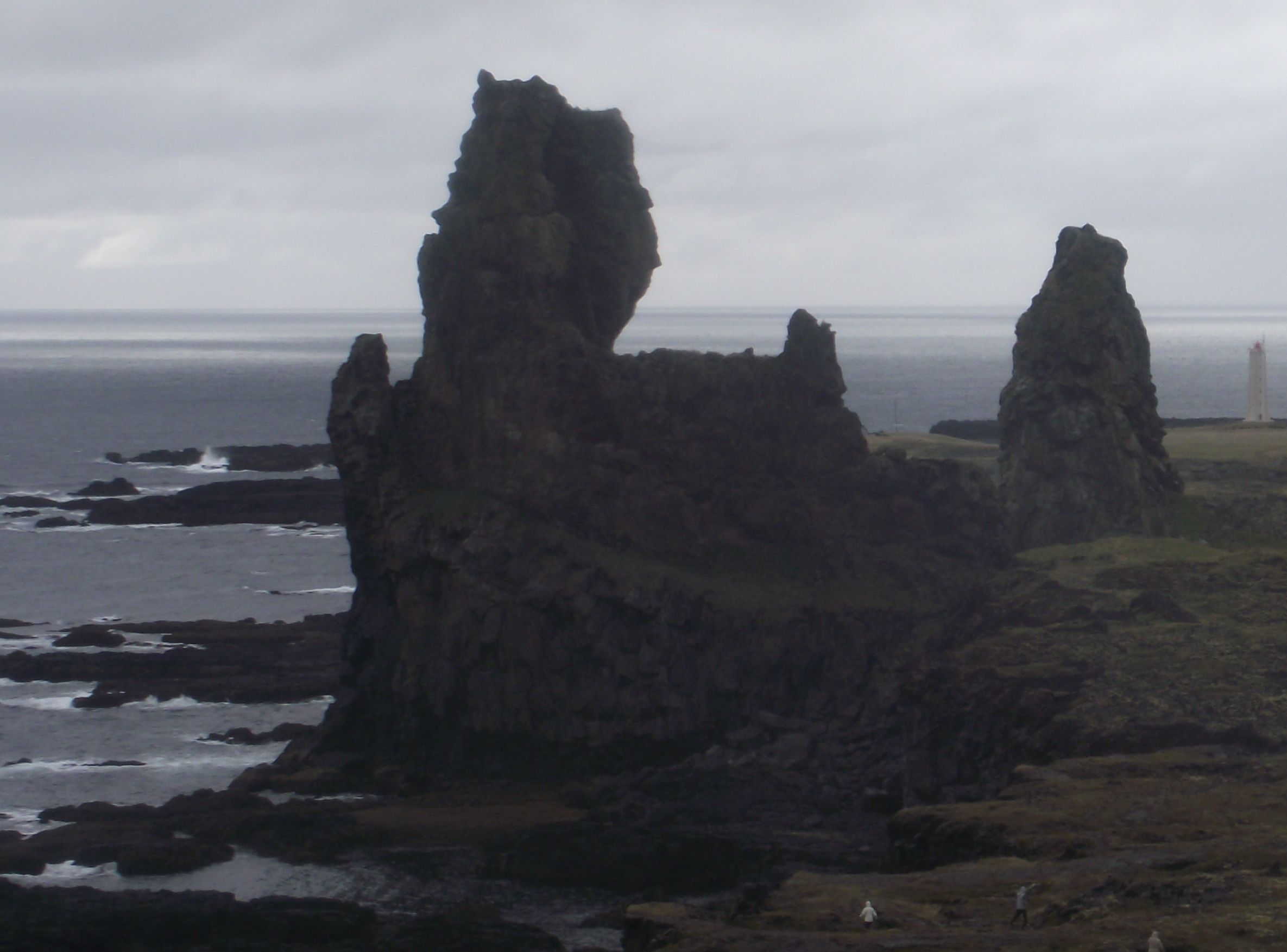 Londragar en la península de Snæfellsnes en Islandia. Fotografía de mala calidad, condiciones de luz desfavorables